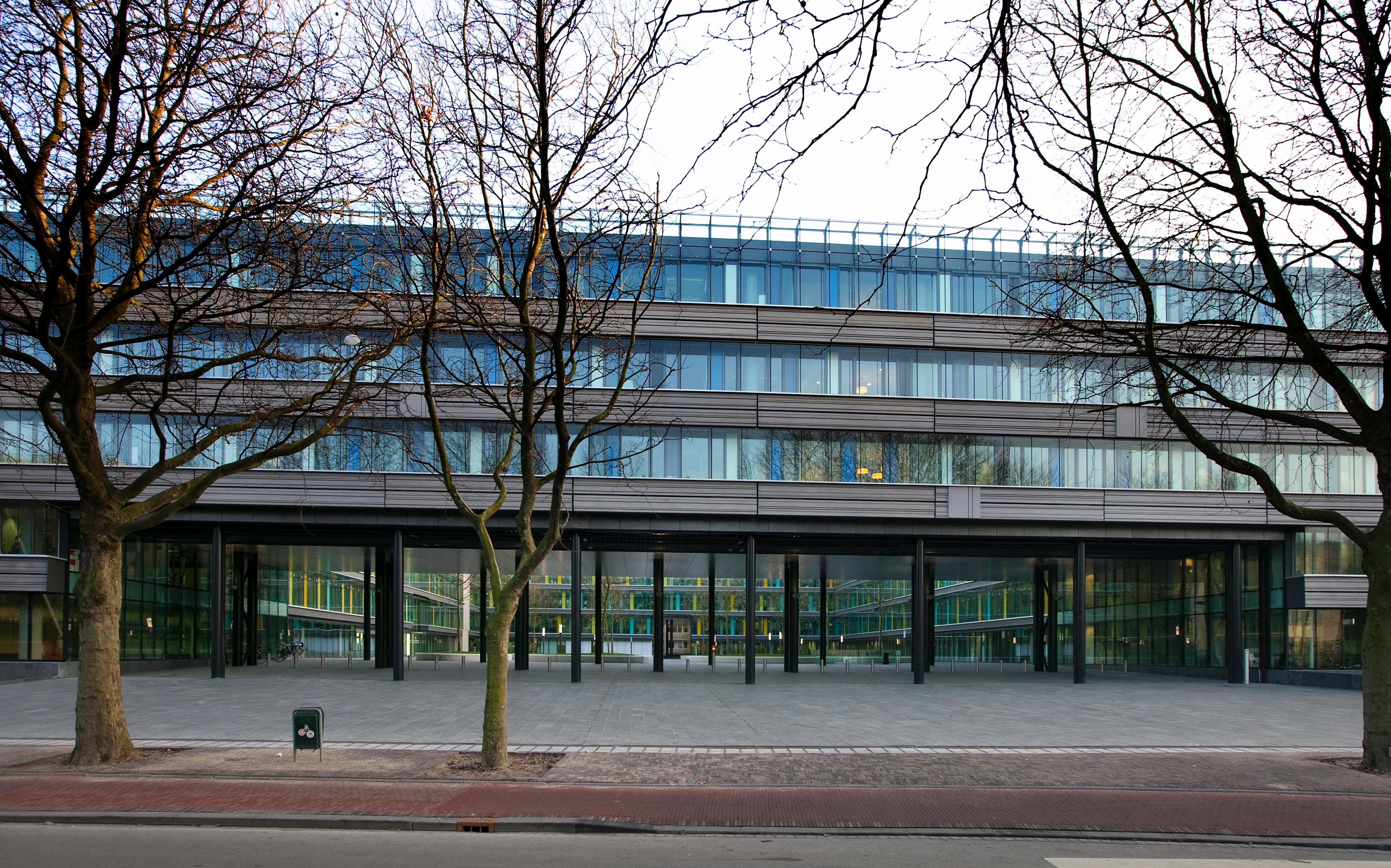 Grote poort van Ministerie van Financiën - na de renovatie.